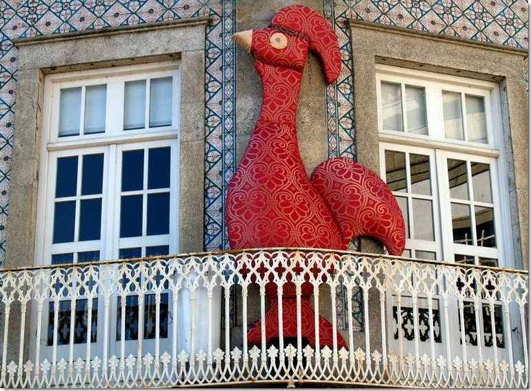 sur la façade d'un immeuble. Dans cette belle ville, il y a de nombreux coqs, les uns plus colorés que les autres... voir aussi notre blog il contient plus de 1400 photos de portes et fenêtres